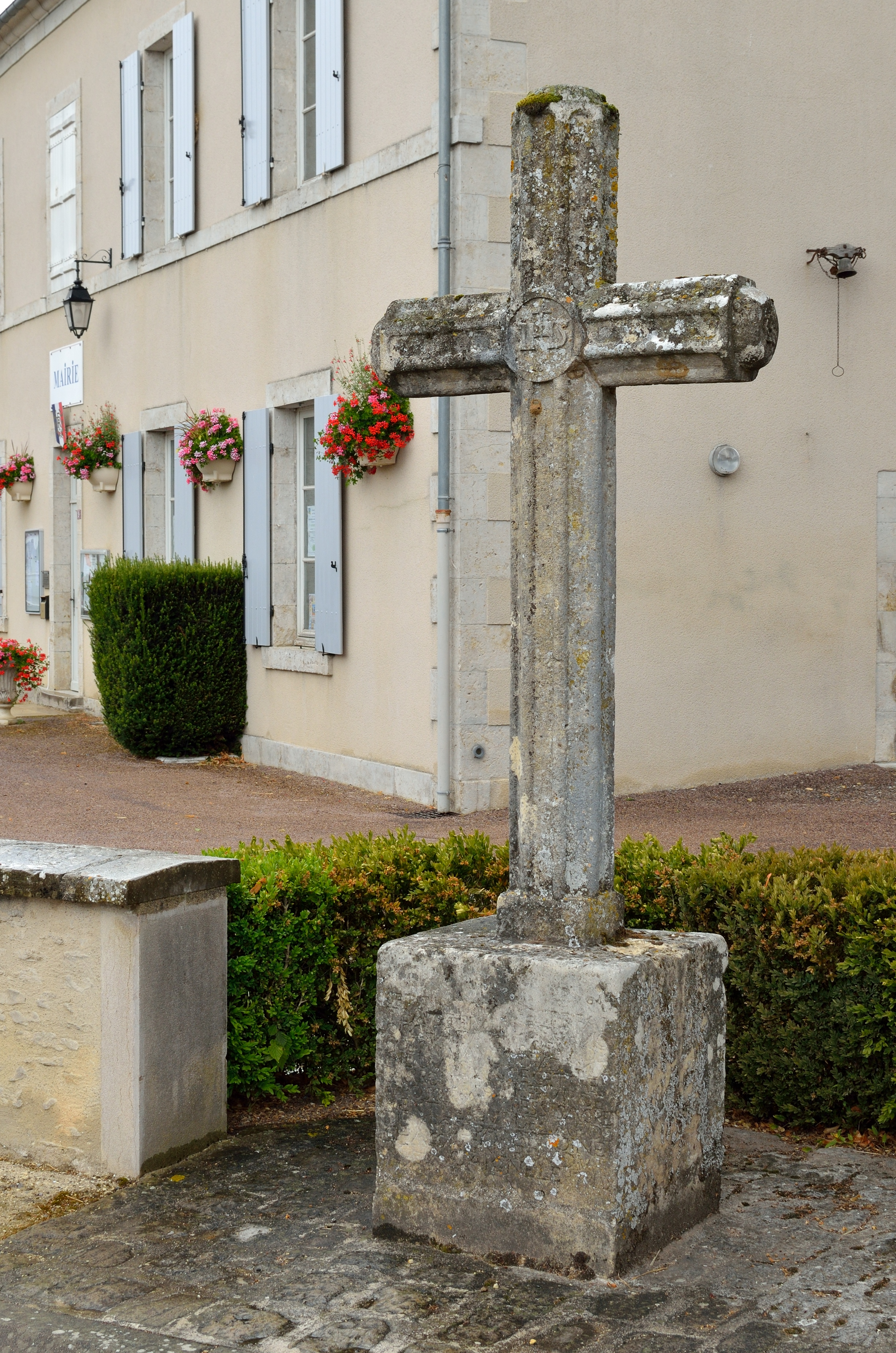 Croix cannelée a Bessais-de-Fromental (Cher)